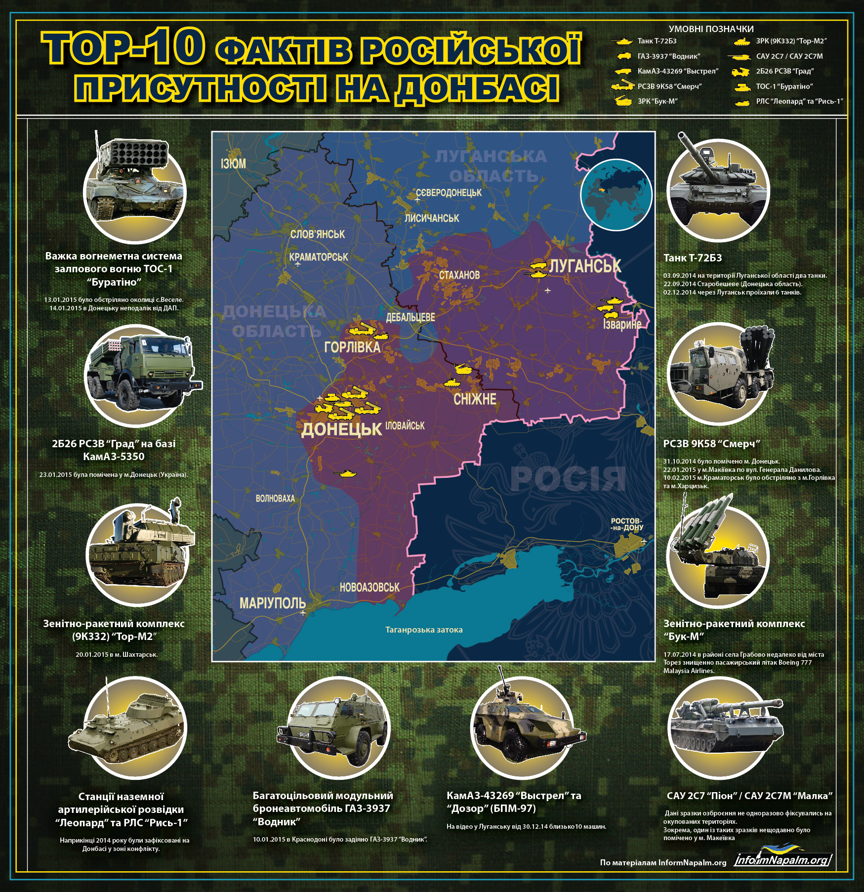 Інфографіка від Inform Napalm. Top-10 фактів російської присутності на Донбасі